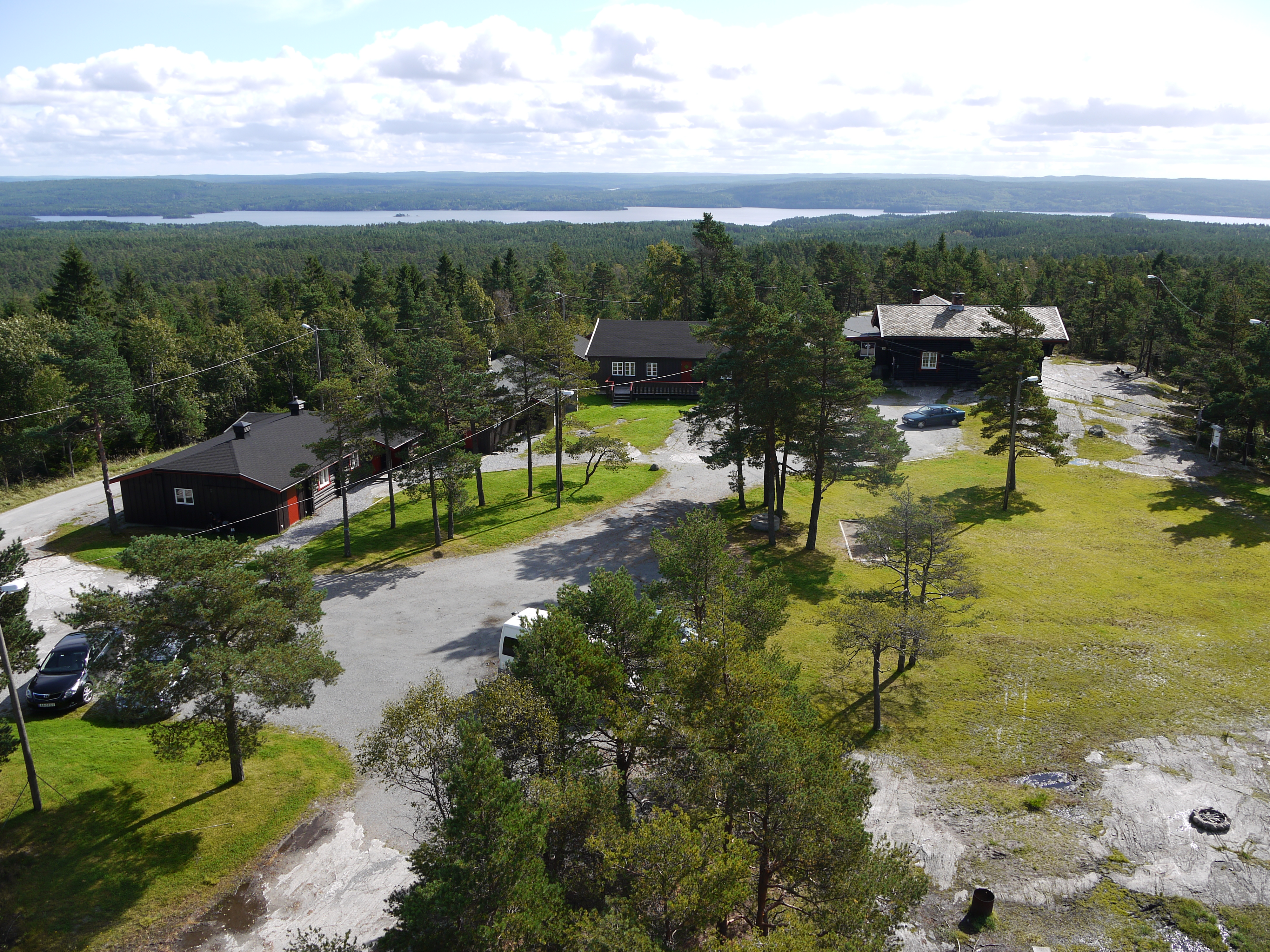 Høiåshytta og høiåsanlegget med Femsjøen i bakgrunn.